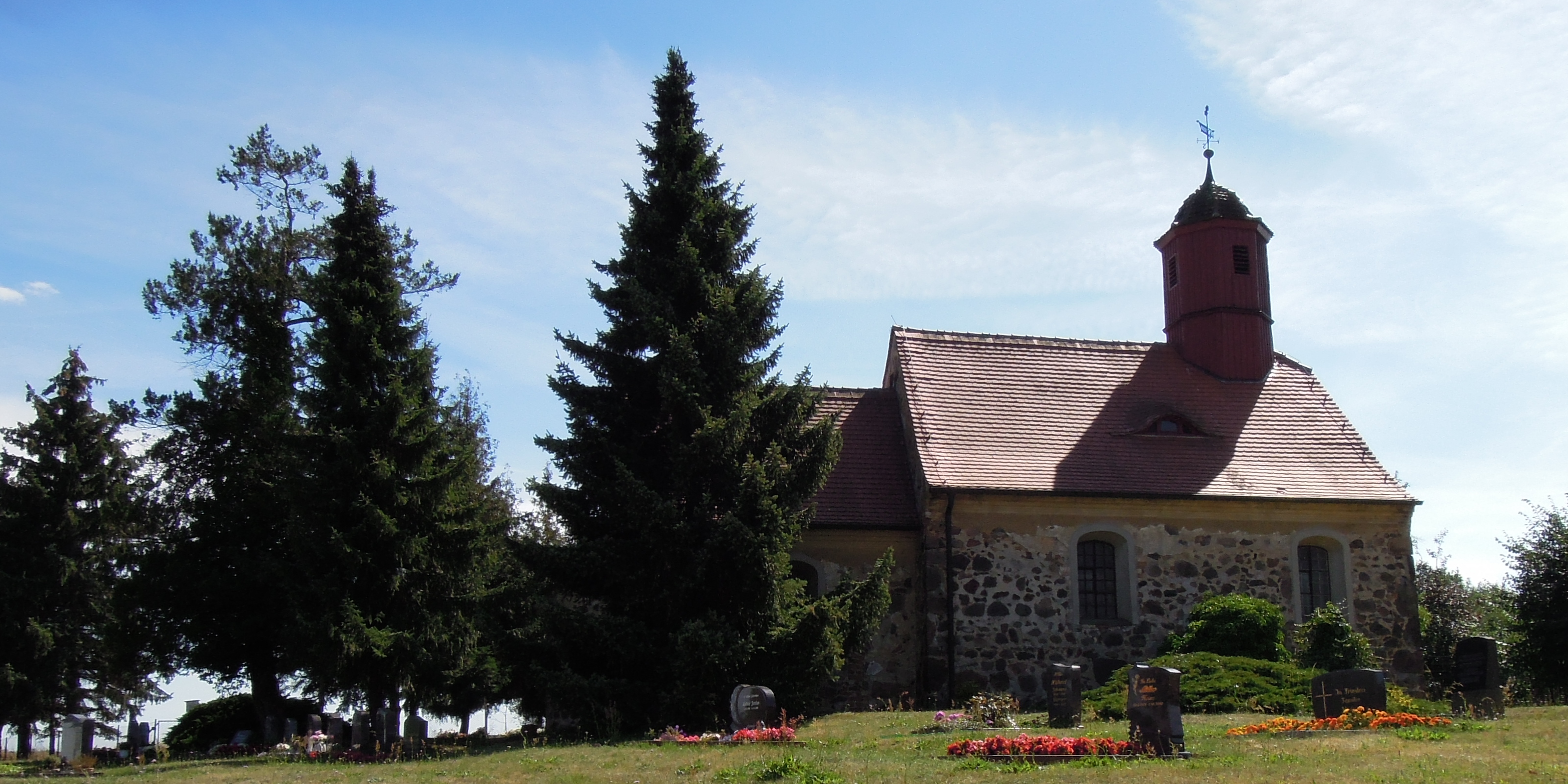 Kirche Ogkeln -Nordnordostansicht im Langkartenzuschnitt- im August 2020